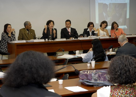 Durante sessão da CPI do Sistema Carcerário, a ministra da Secretaria Especial de Políticas para as Mulheres, Nilcéa Freire, pediu colaboração do Congresso para sensibilizar o Judiciário e os governos estaduais a aderirem ao Pacto Nacional pelo Enfrentamento à Violência contra as Mulheres